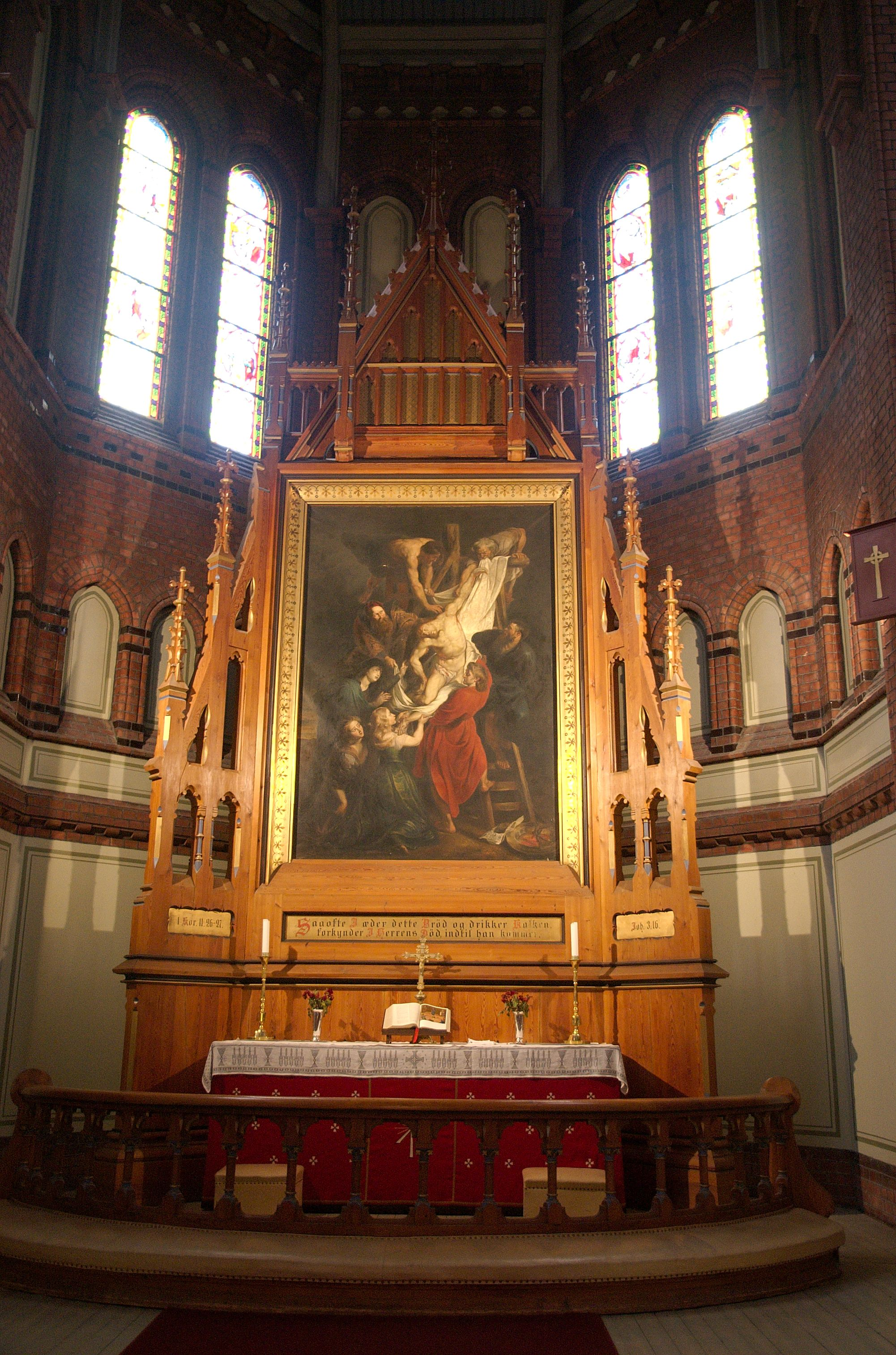 Alteret i Sagene kirke. Utført av Christen Brun (1828-1905) etter en original av Rubens.